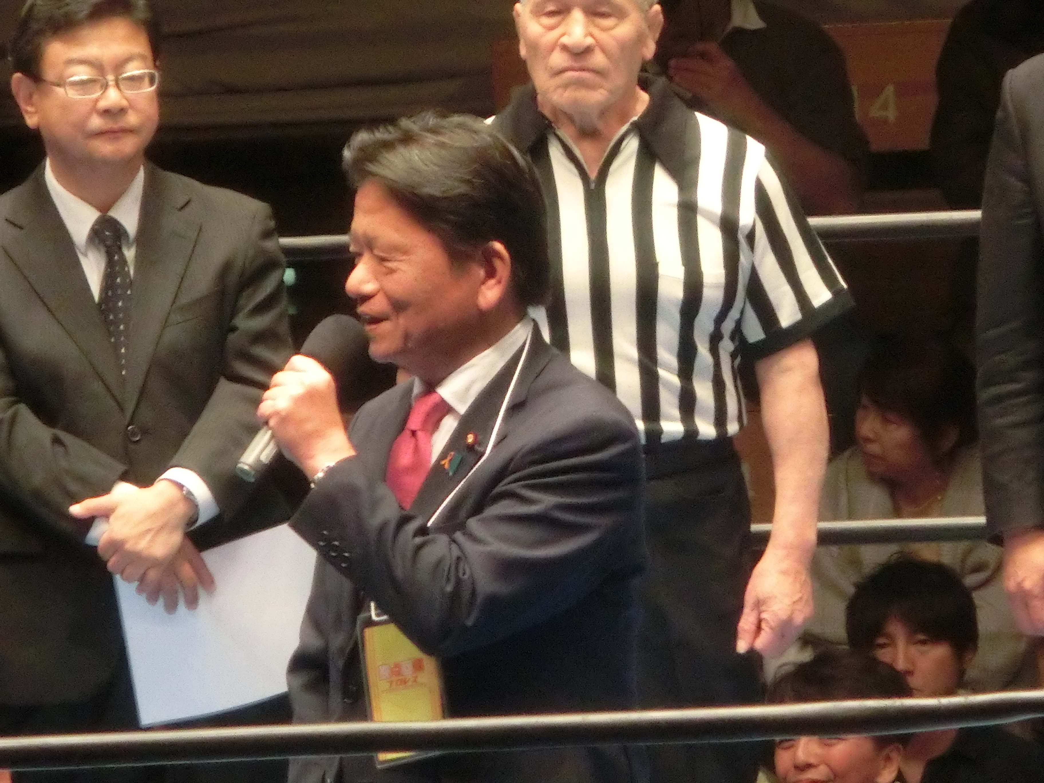 三ッ林裕巳2017年